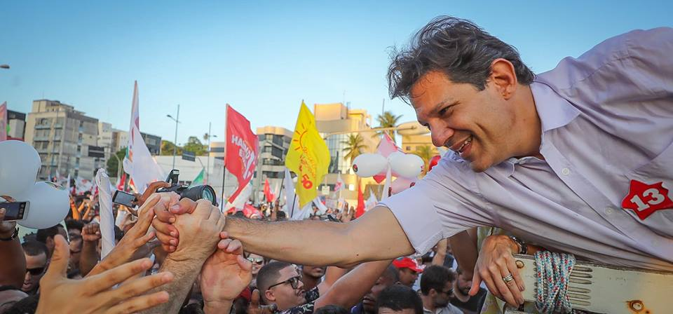 Caminhada da vitória com Haddad em Salvador, às vésperas do segundo turno de 2018